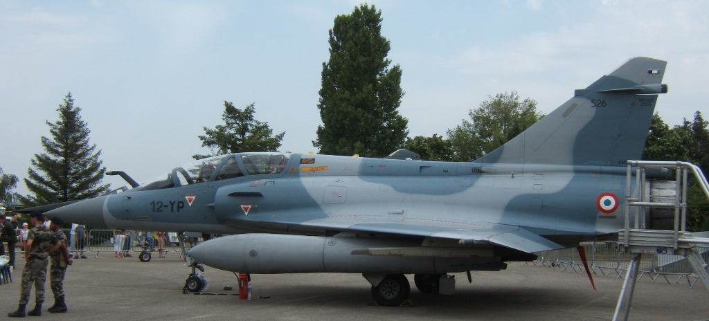 Mirage 2000B